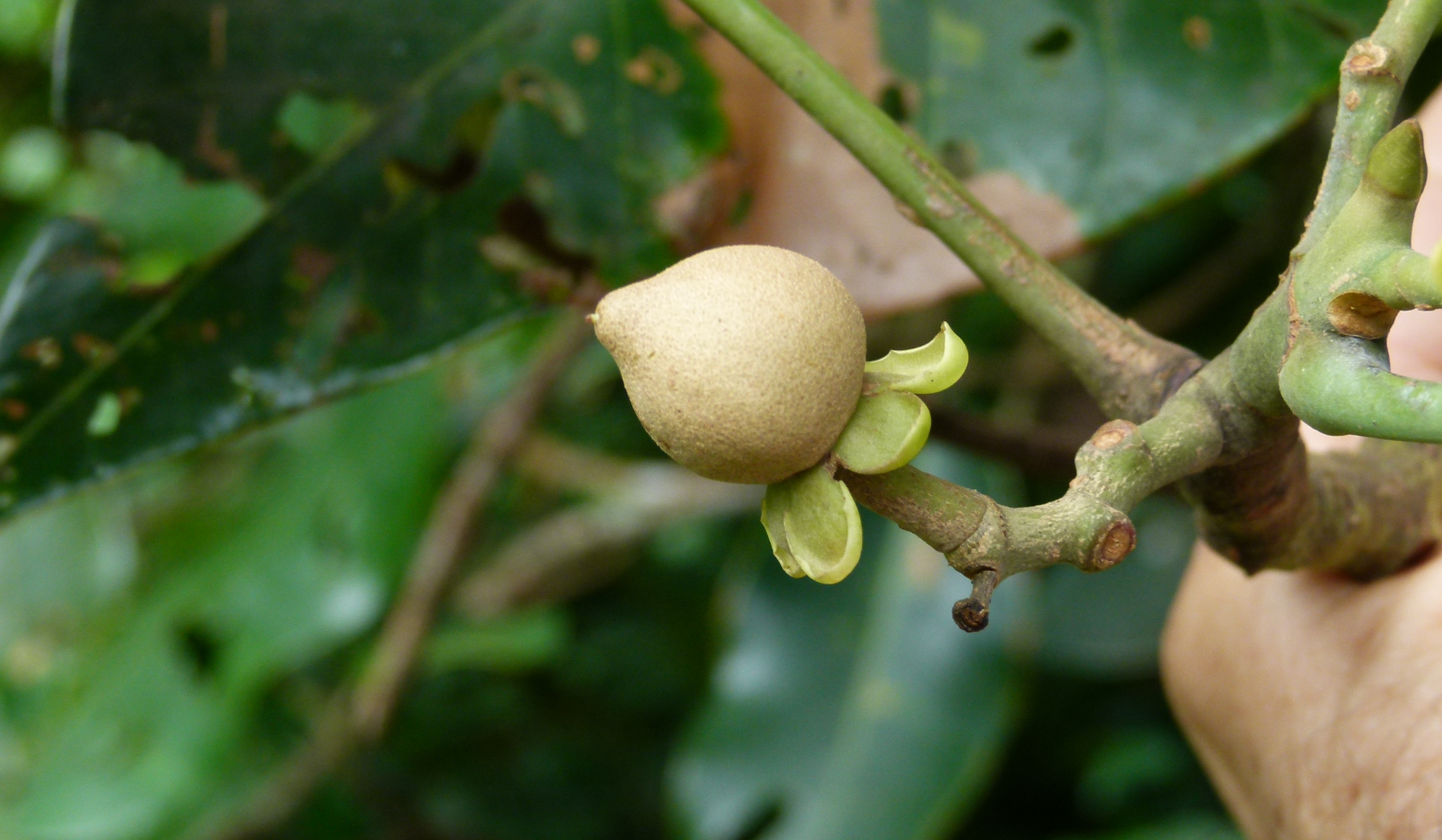 Route du Morne Seychellois, Mahé.